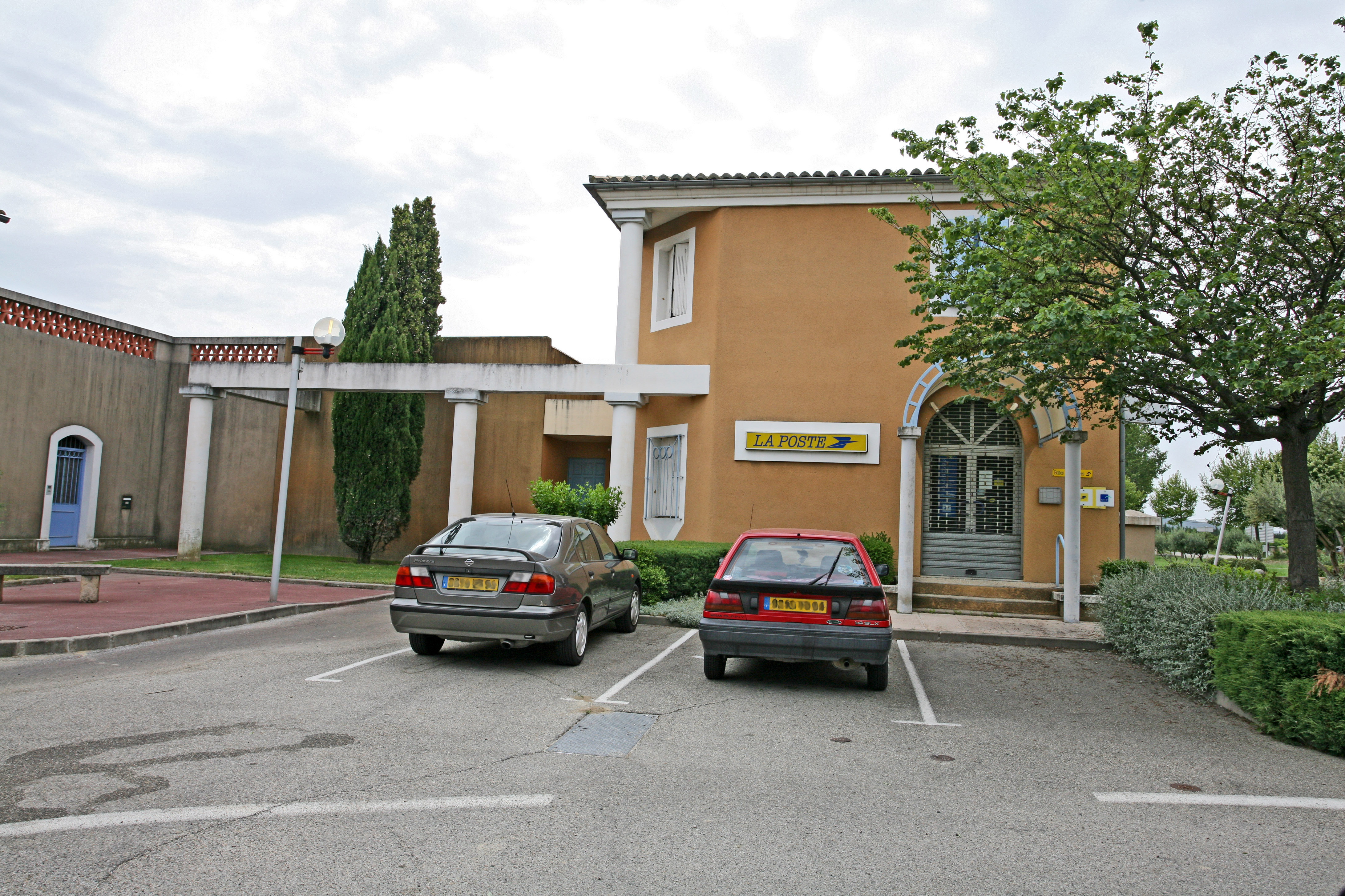 La poste de Lamotte-du-Rhône (commune de Vaucluse)